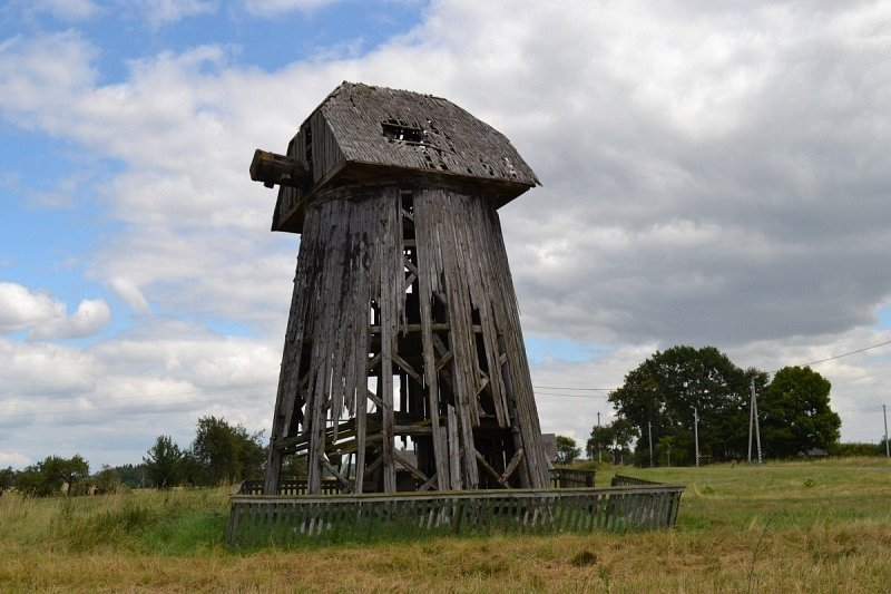 Шайкі. Вятрак